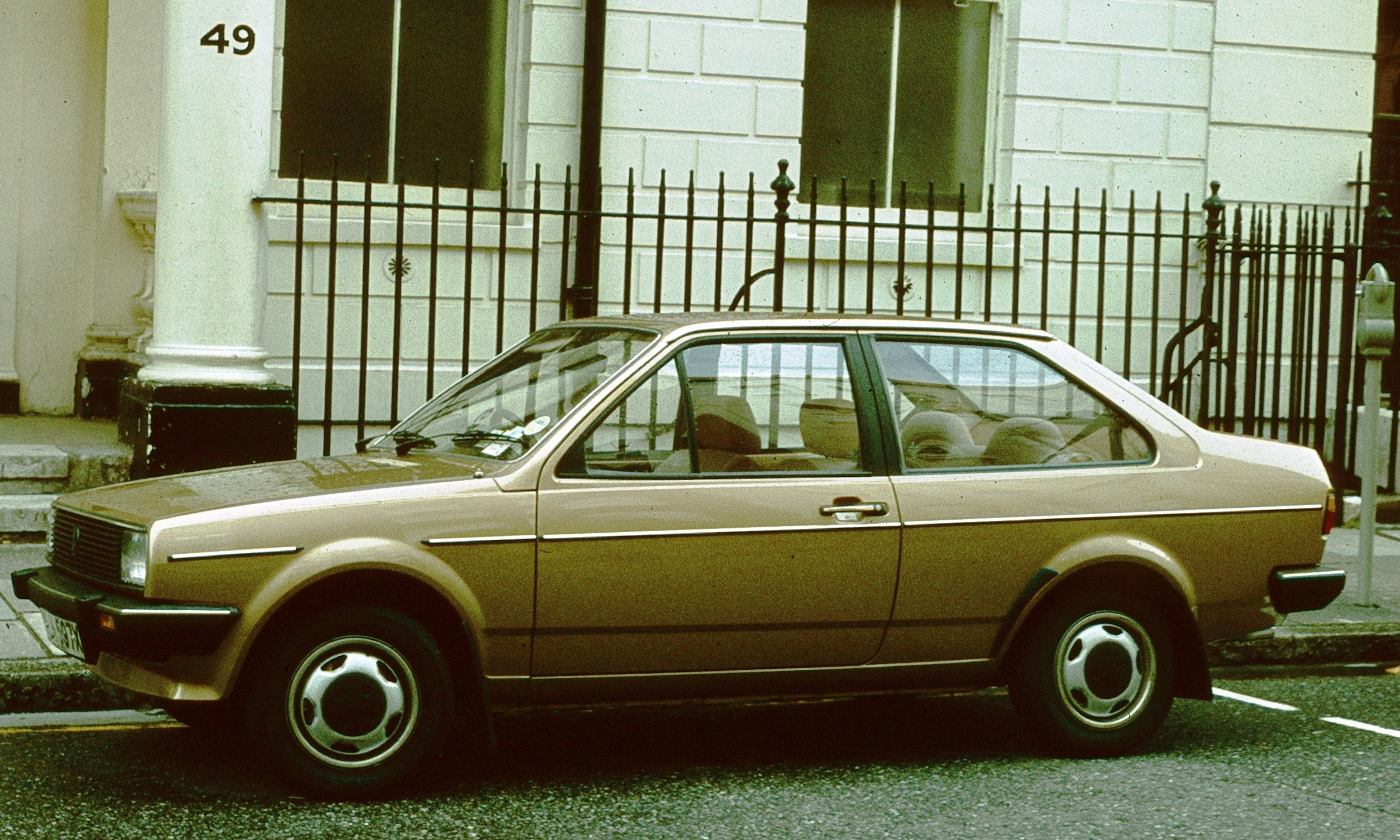 Volkswagen Derby second generation